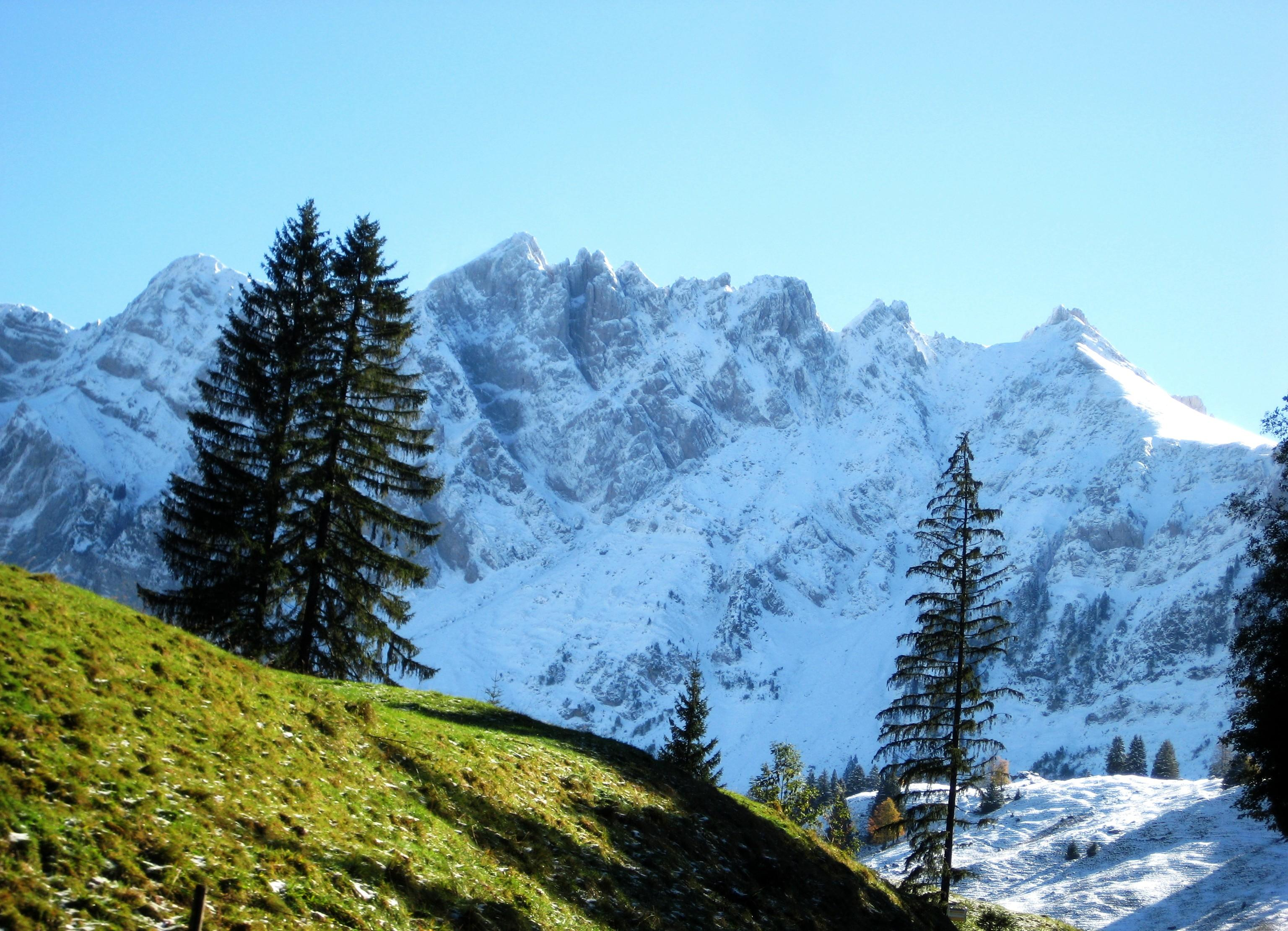 Silberplatten, near Säntis